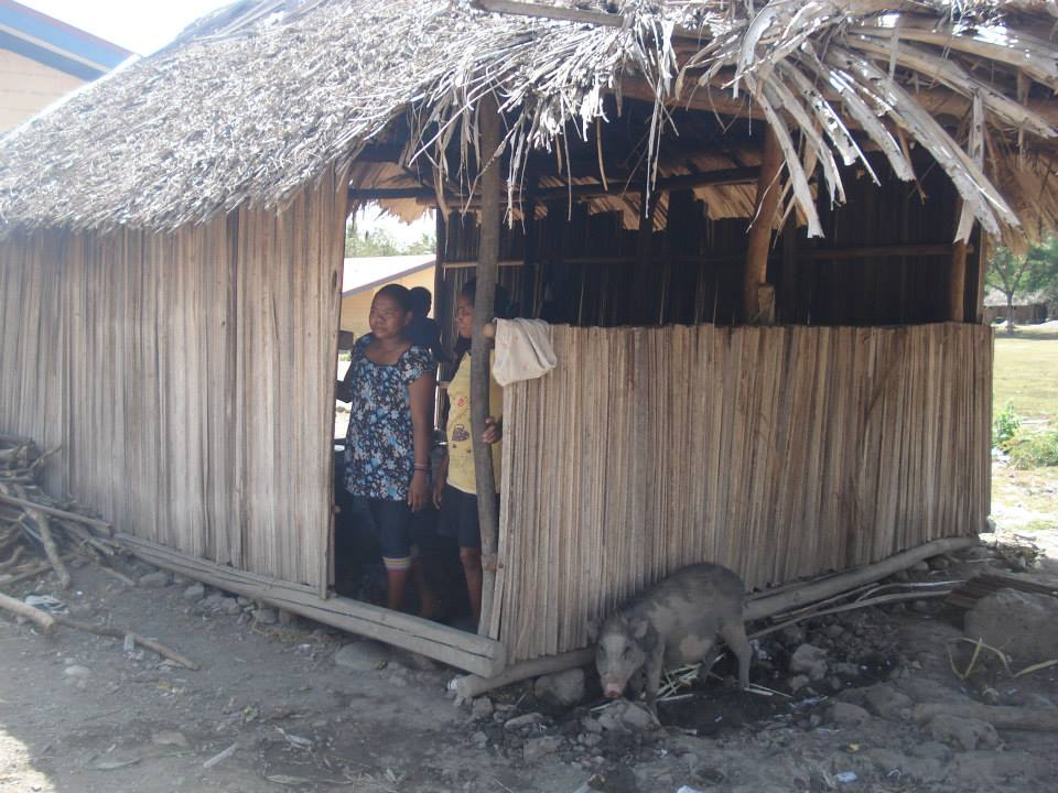 Fatuberlio, Manufahi